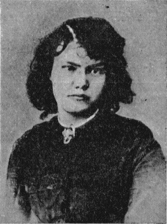 Aleksandra Jakovlevna Obodovskaja Sidorackaja (1847-?)